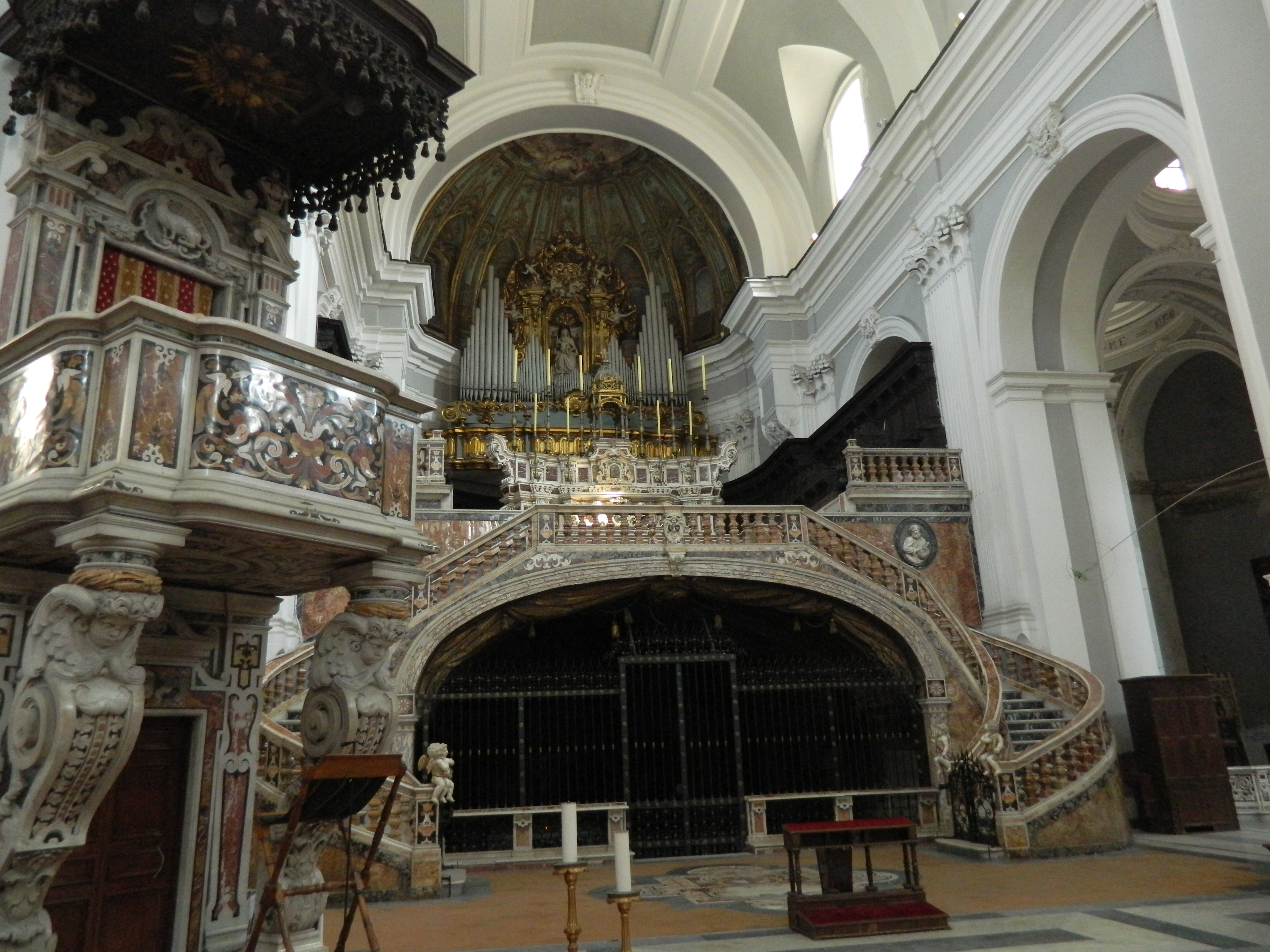 Basilica di Santa Maria della Sanità (Napoli)